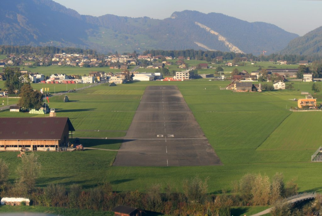 Flugplatz Kägiswil, Landebahn, Luftaufnahme, Kanton Obwalden, Schweiz